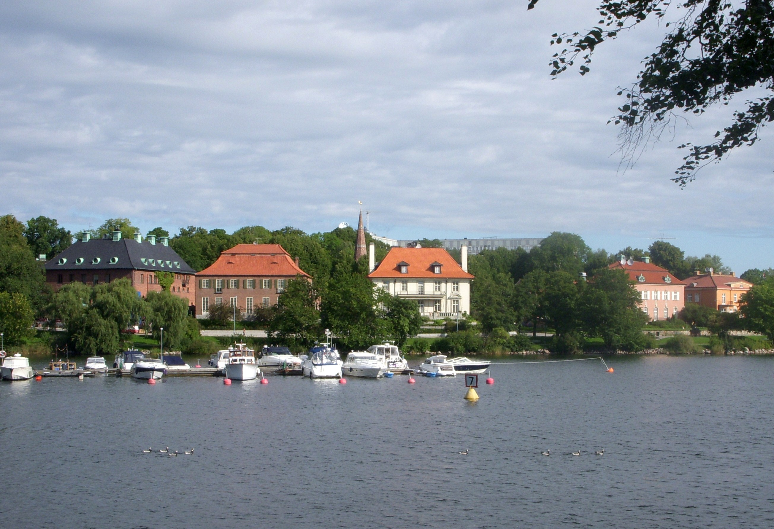 Diplomatstaden i Stockholm, vy över Djurgårdsbrunnsviken från Södra Djurgården